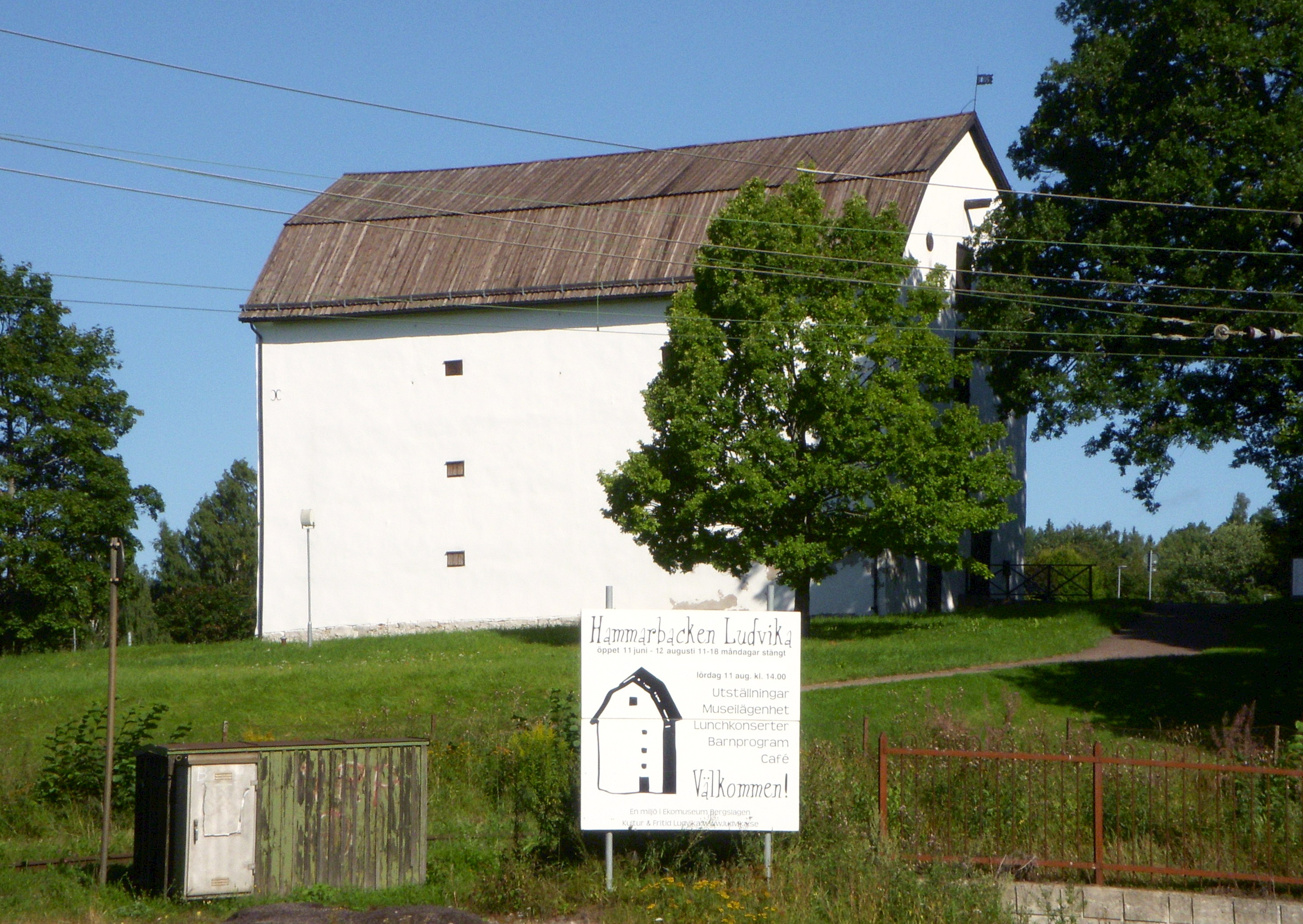 Hammarbacken, Ludvika, magasin